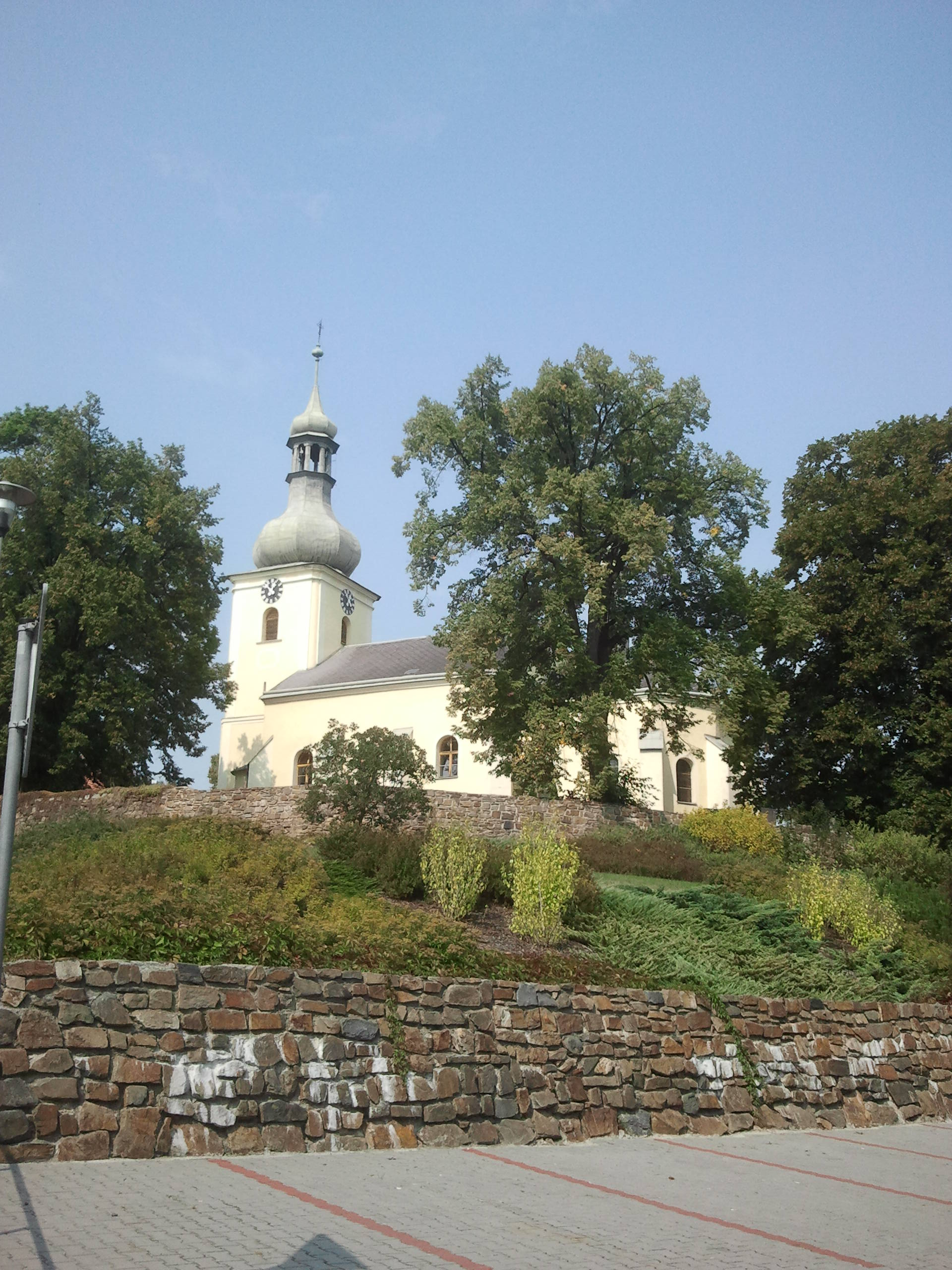 Kostel sv. Václava (Velká Polom), Velká Polom